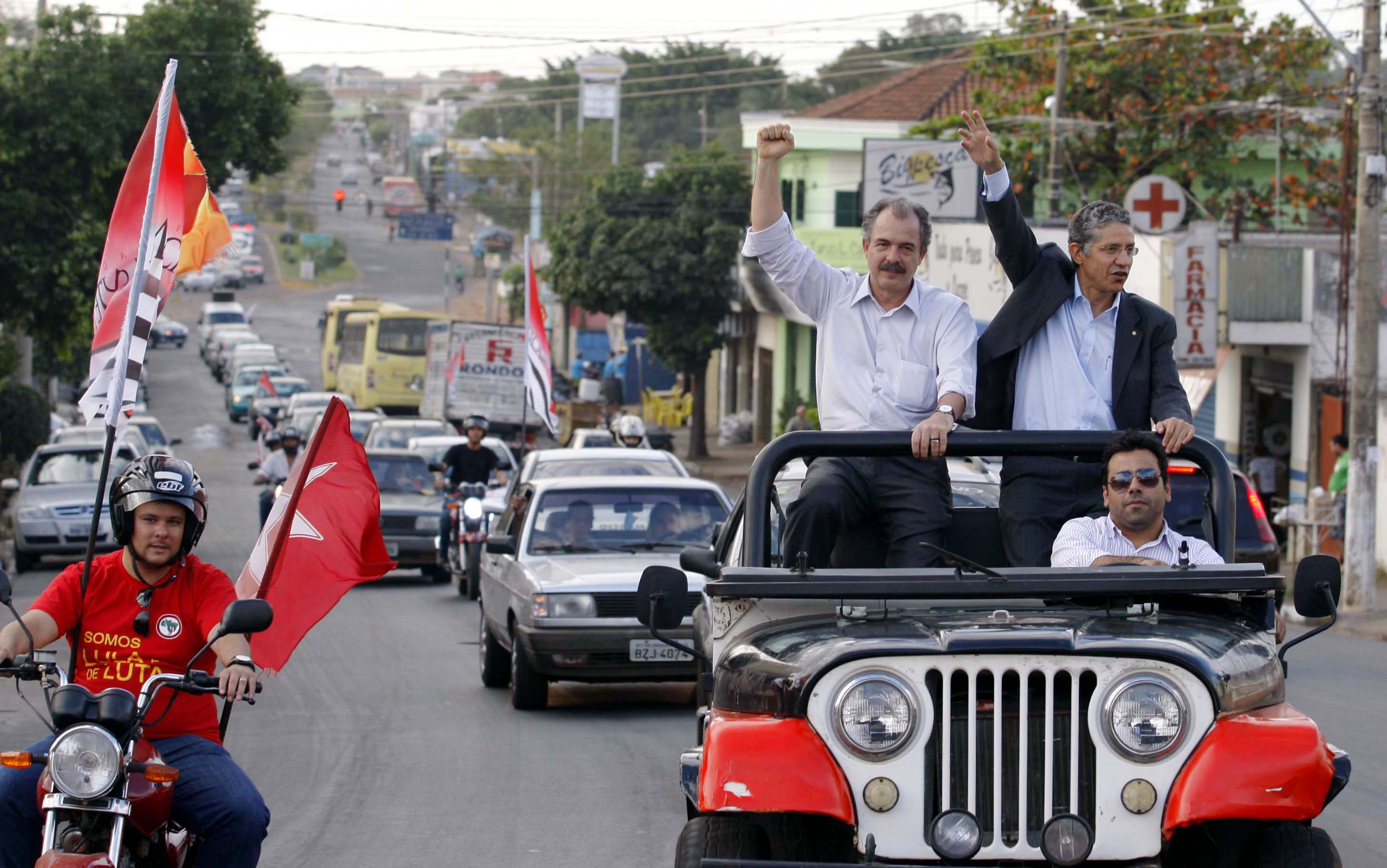 29.07.2010 - Caminha no centro de Araçatuba. Foto: Cesar Ogata